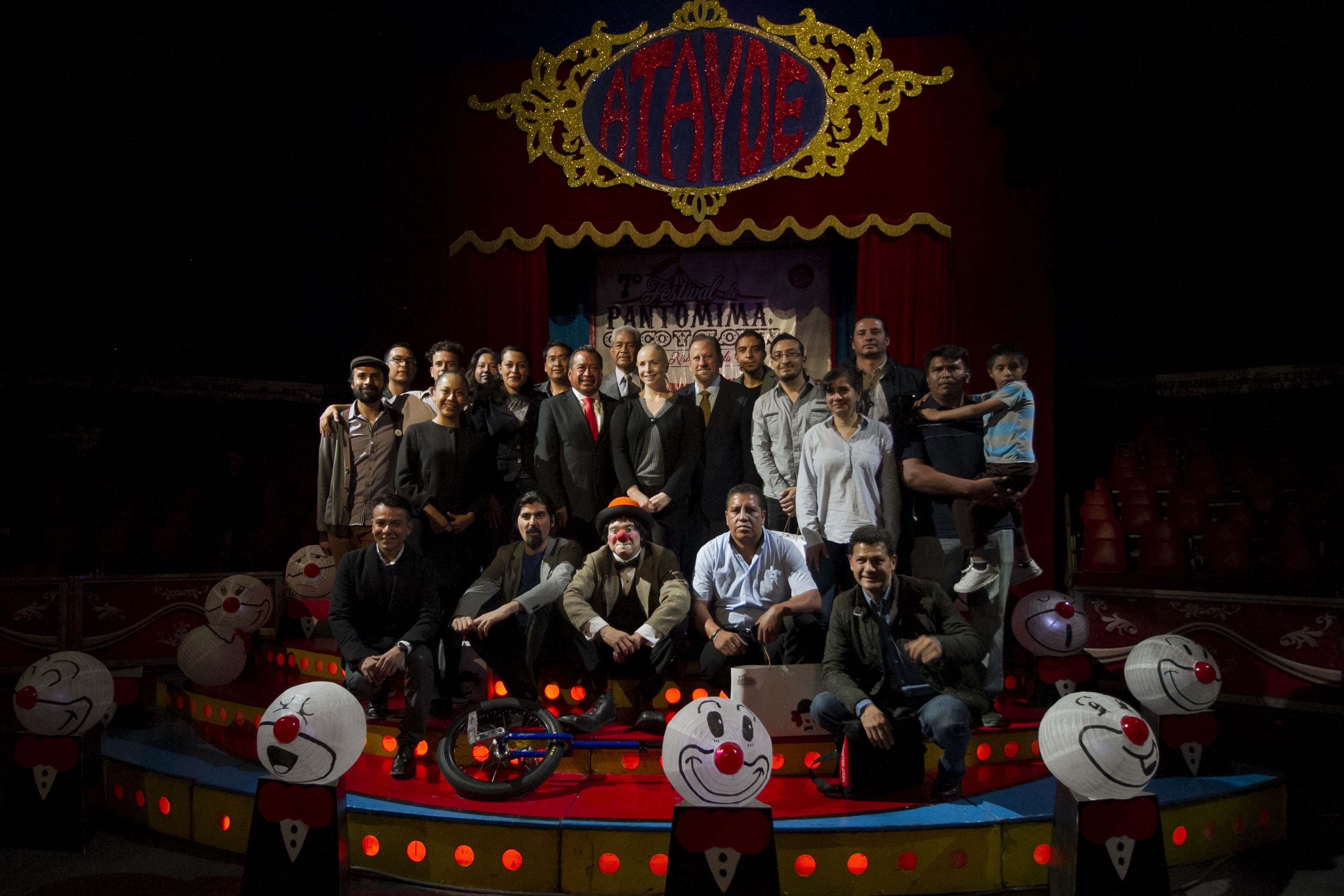 Martes 12 de julio de 2016. En la Carpa Astros, se ofreció una conferencia de prensa, presidida por el Secretario de Cultura de la Ciudad de México, Eduardo Vázquez Martín, para dar los pormenores del 7º Festival de Pantomima, Circo y Clown. La risa sagrada, que se realizará en el Faro Milpa Alta con la participación de actores y compañías nacionales e internacionales. Fotografía: Tania Victoria / Secretaría de Cultura CDMX.